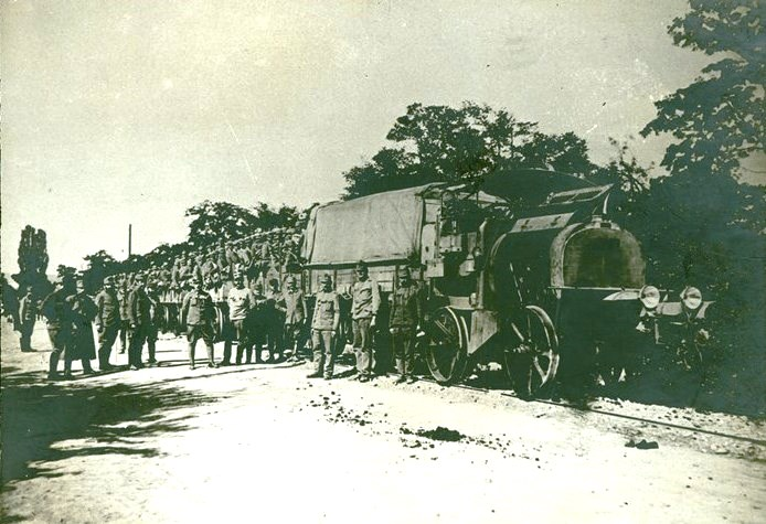 Снимка на австро-унгарски войскови транспорт с полеви влак.